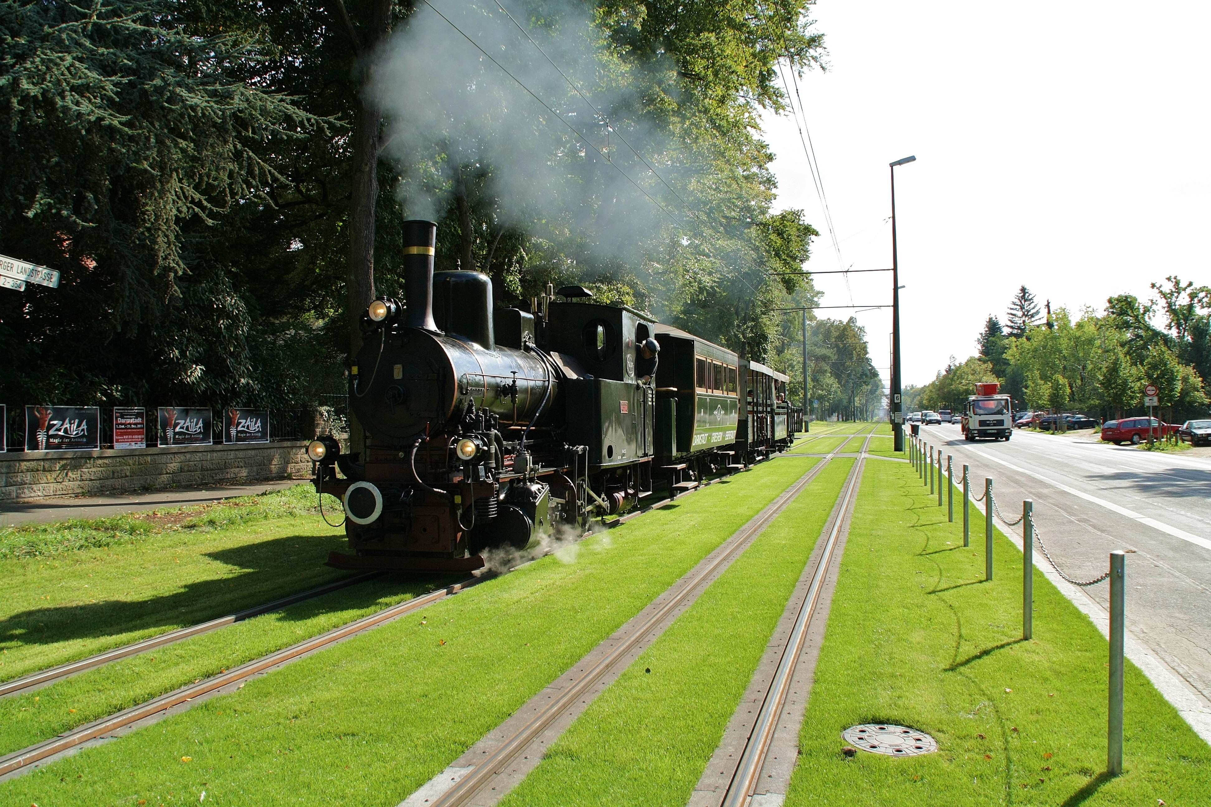 Dampfstraßenbahn „Feuriger Elias“ in Darmstadt